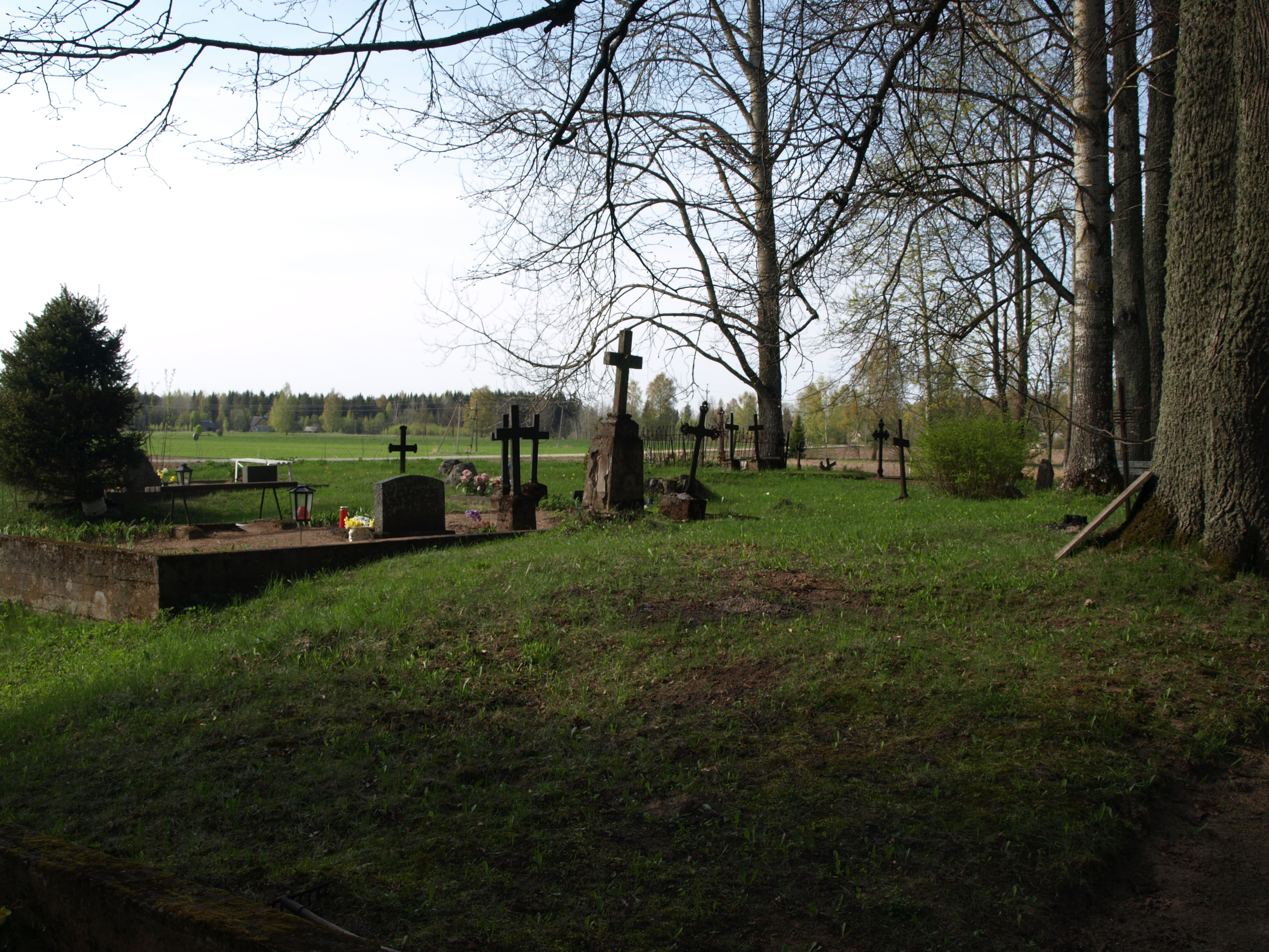 Kraavi kalmistu